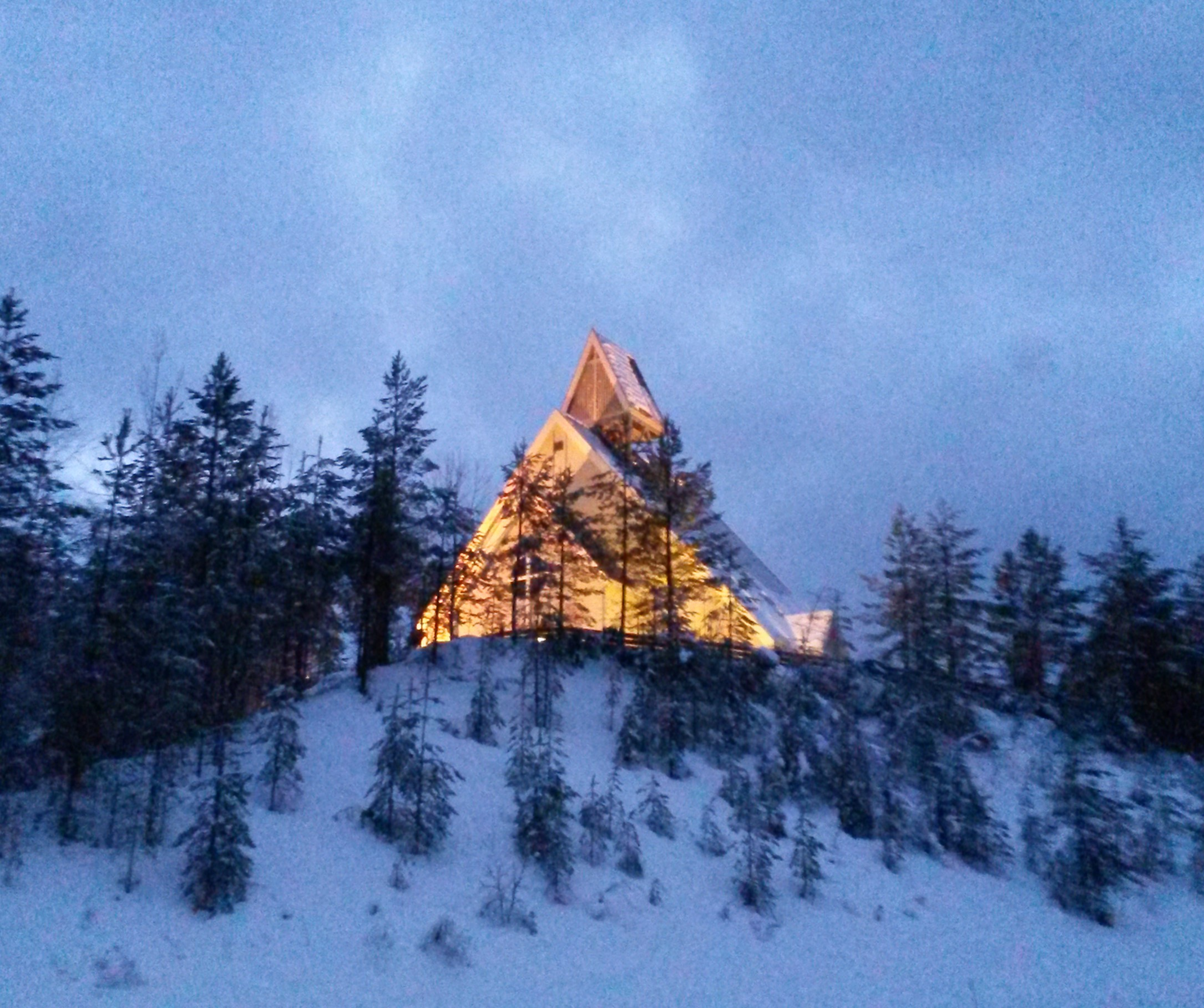 Nordre Trysil kirke i Jordet